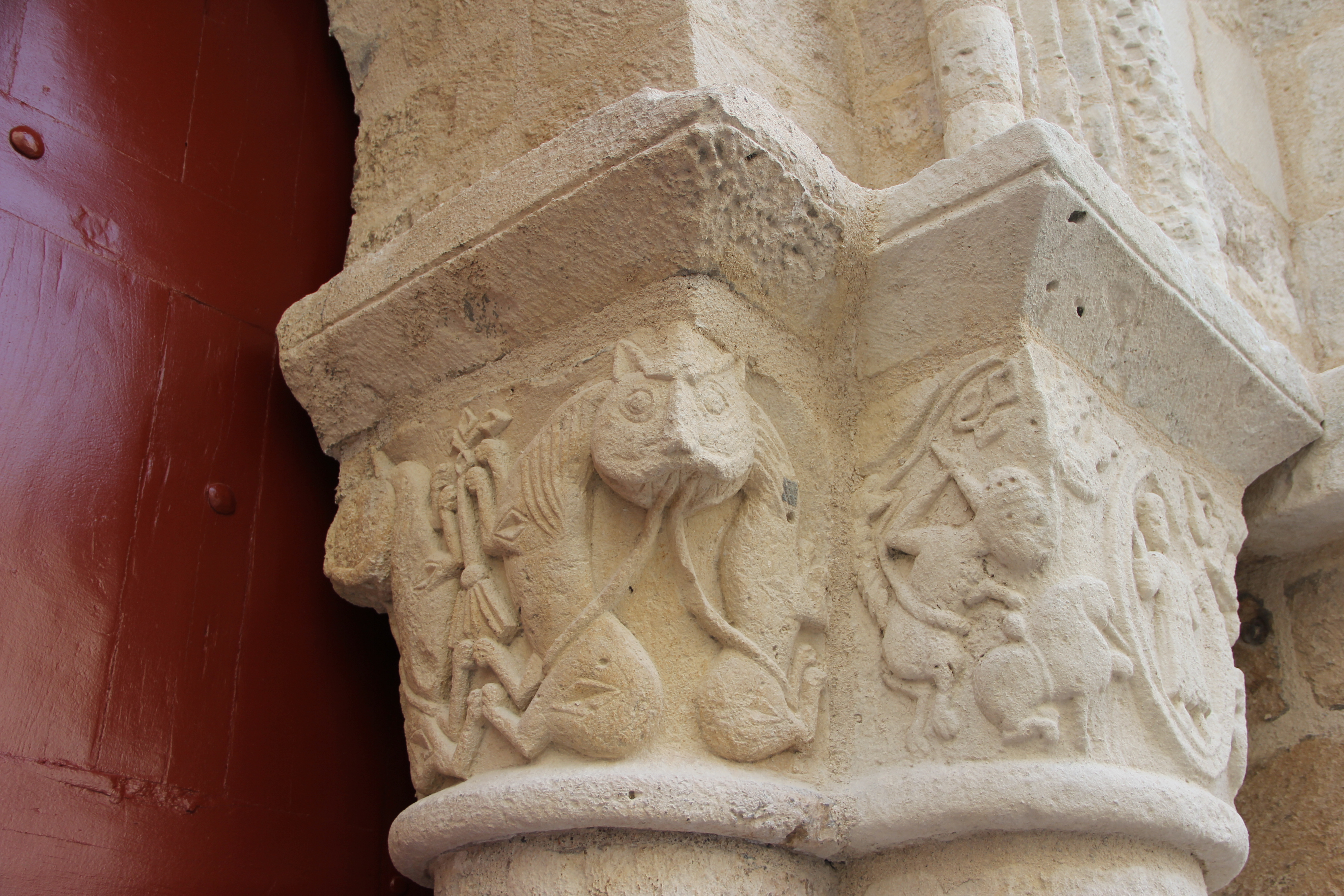 Chapiteau. Baptistère Saint-Jean Poitiers